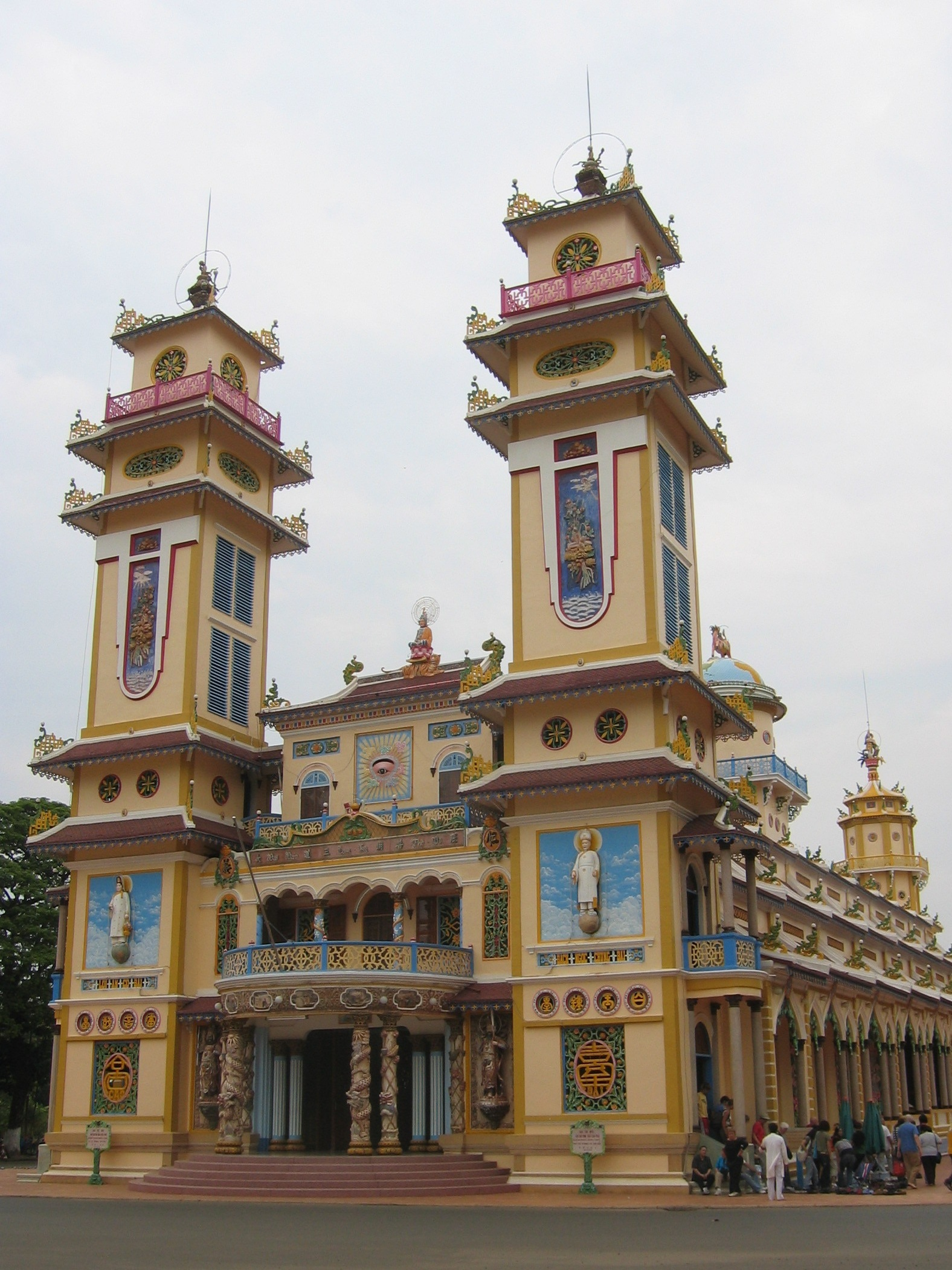 Tempel Cao Dai Frontansicht Tay Ninh Vietnam